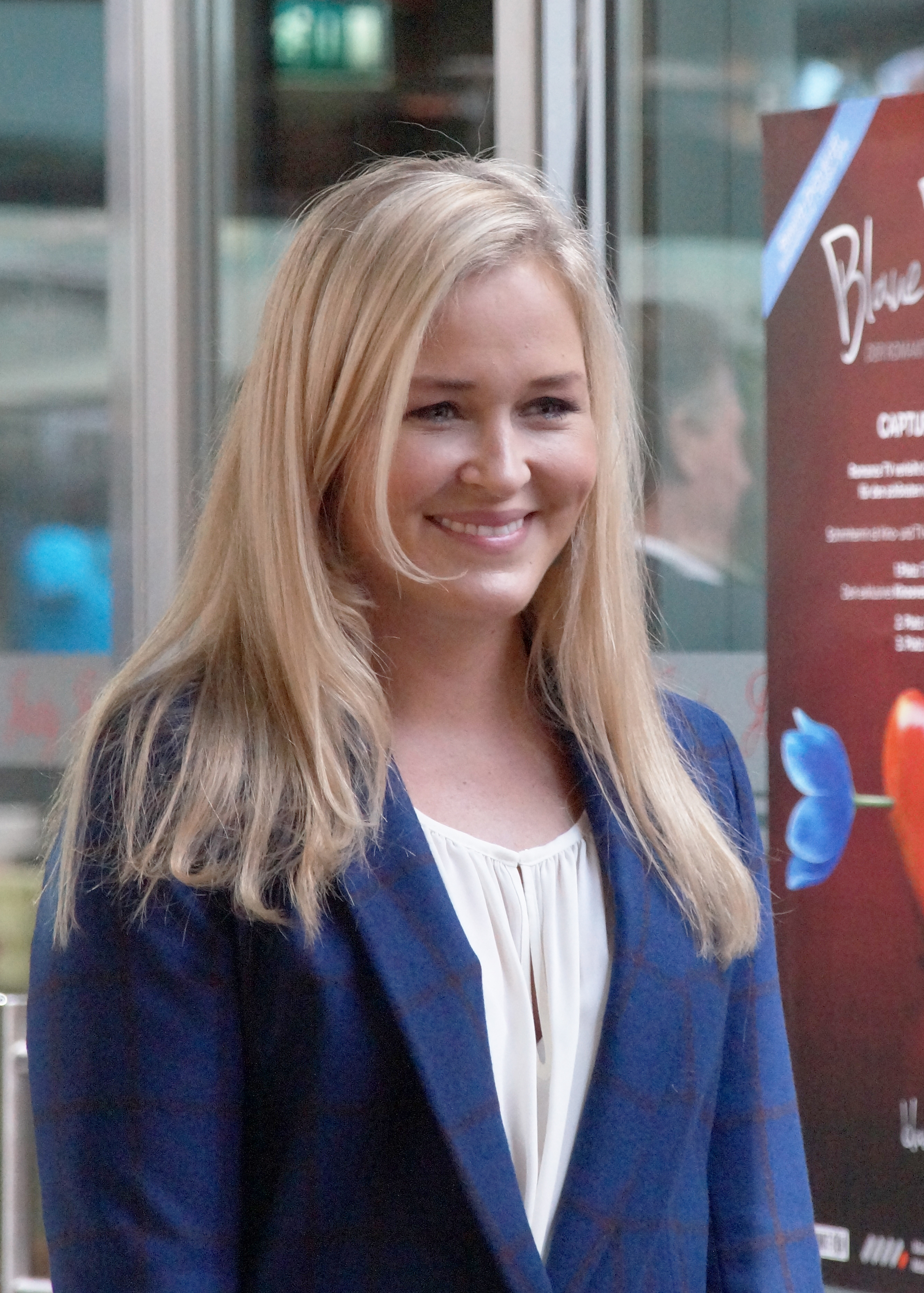 Judith Hoersch bei der Verleihung des Kurzfilmpreises "Blaue Blume", am 10.02.2016, im Sony Center Berlin.